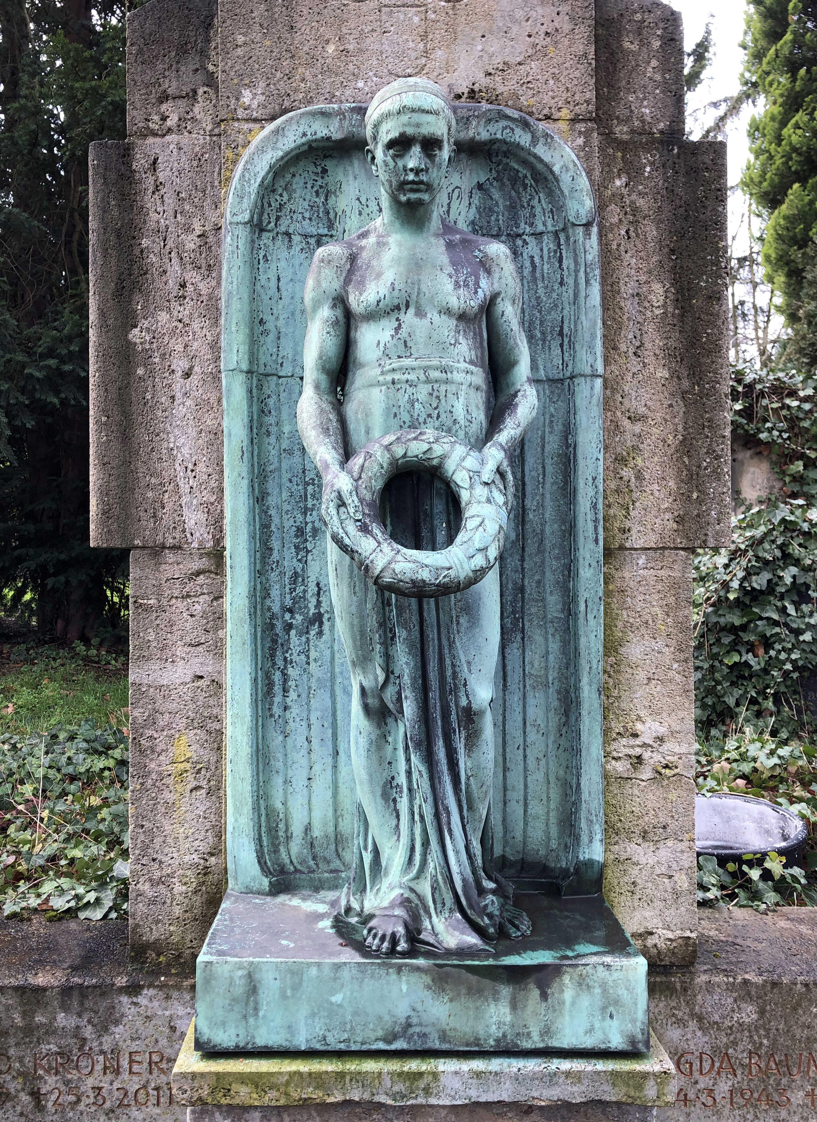 Bronzeskulptur von Bildhauer Josef Körschgen (1876–1937) auf Grabstätte Christian Kröner, Nordfriedhof Düsseldorf